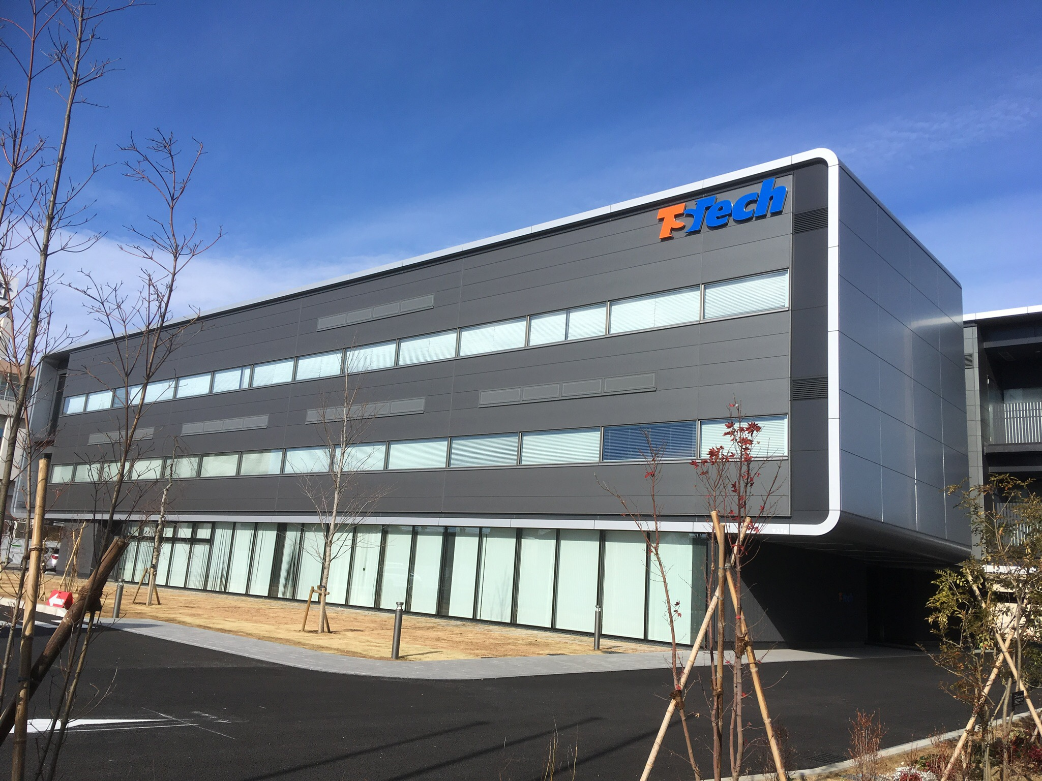 テイ・エス テック株式会社 本社（朝霞）